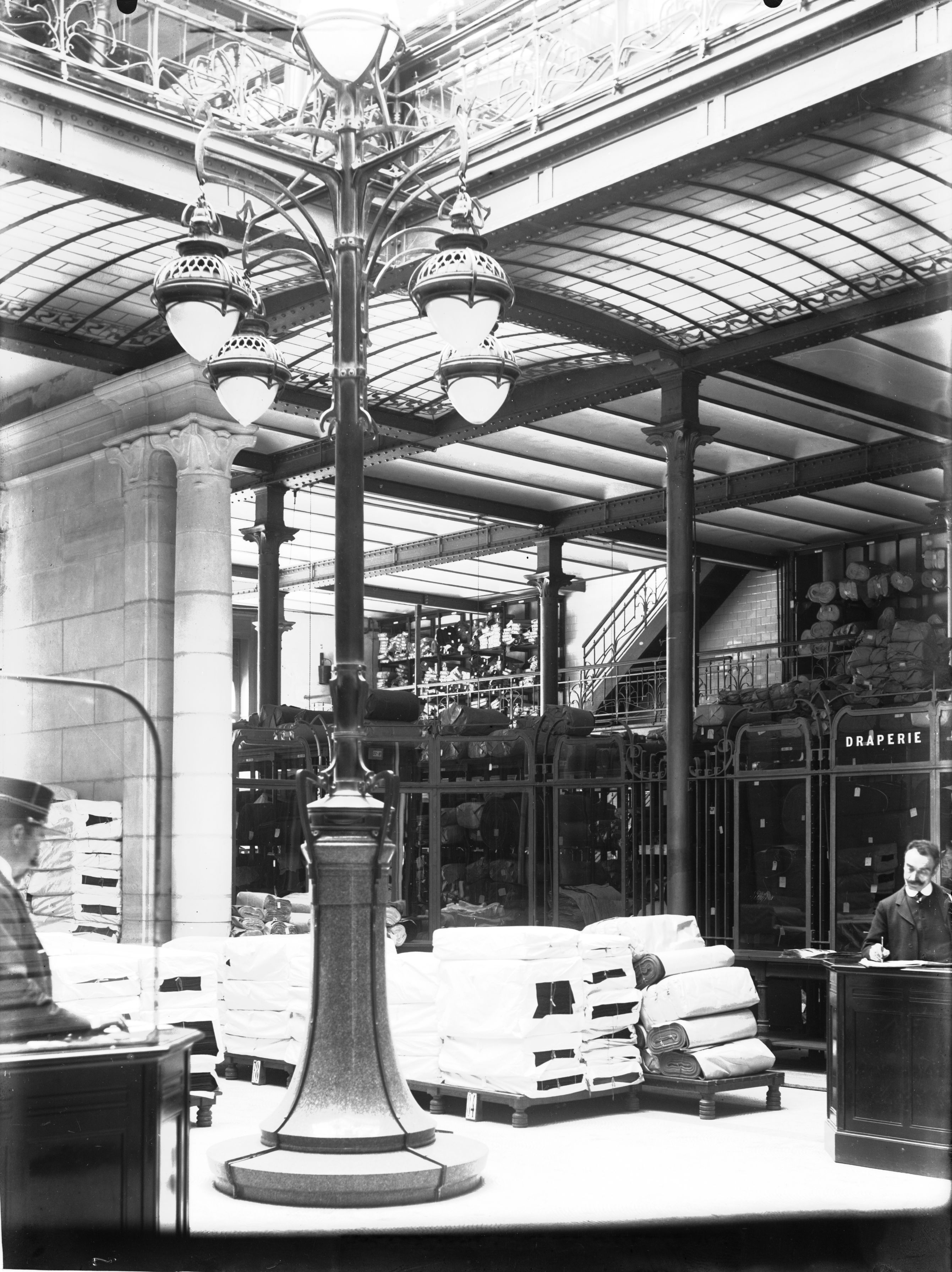 Hall of the Magasins Waucquez (20, rue des Sables, 1000, Brussels), collection Hortamuseum